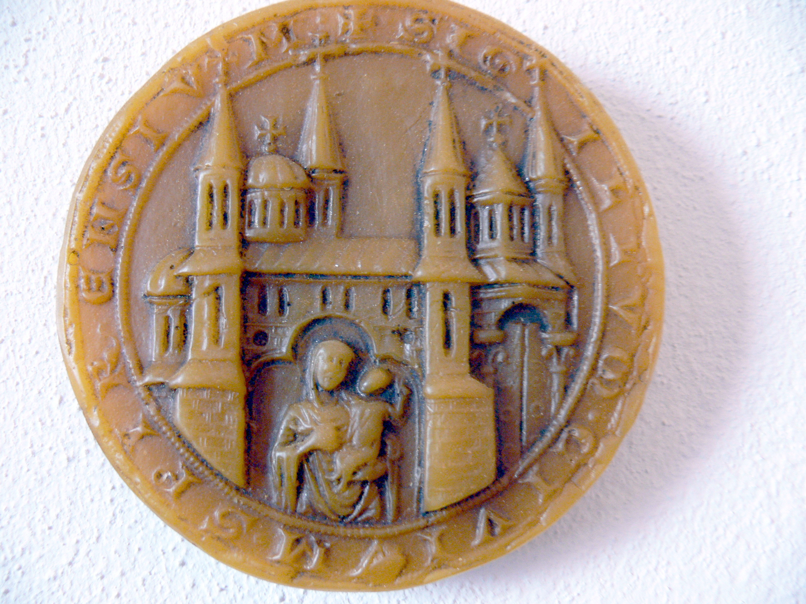 Stadtsiegel von Speyer 1293. Umschrift:"Sigillum Civium Spirensium".